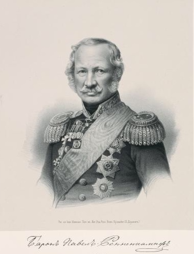 Генерал-лейтенант Павел Яковлевич Ренненкампф